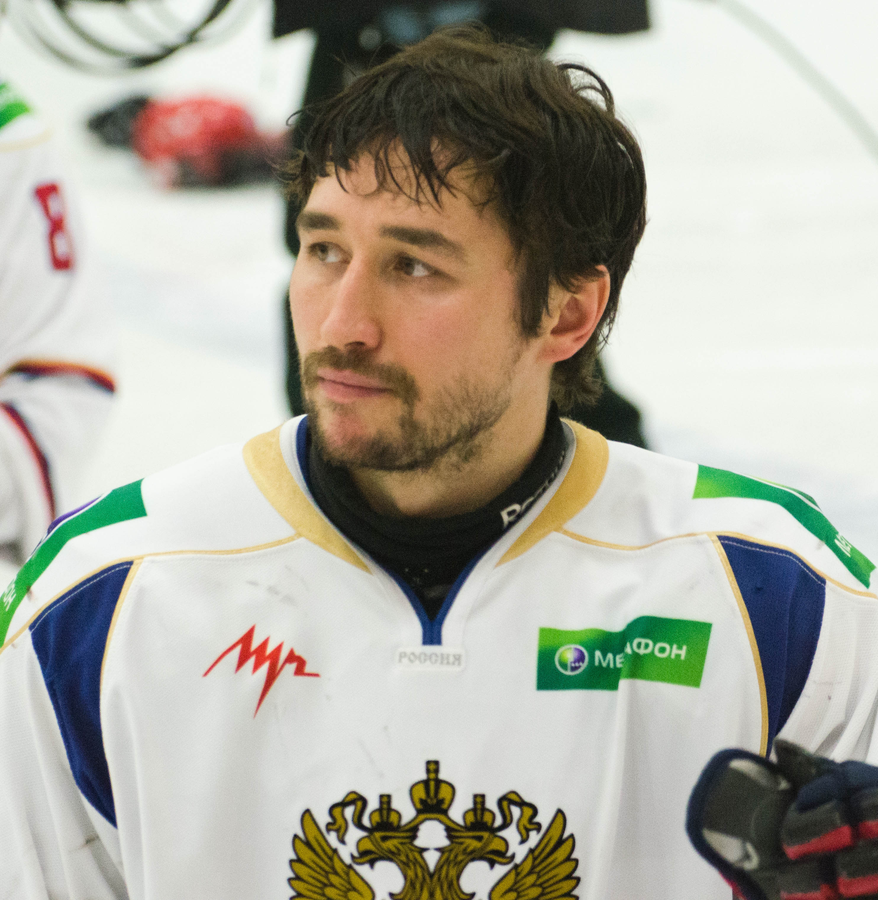 Ilia Volkov, 2015